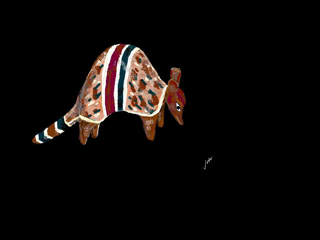 Paint